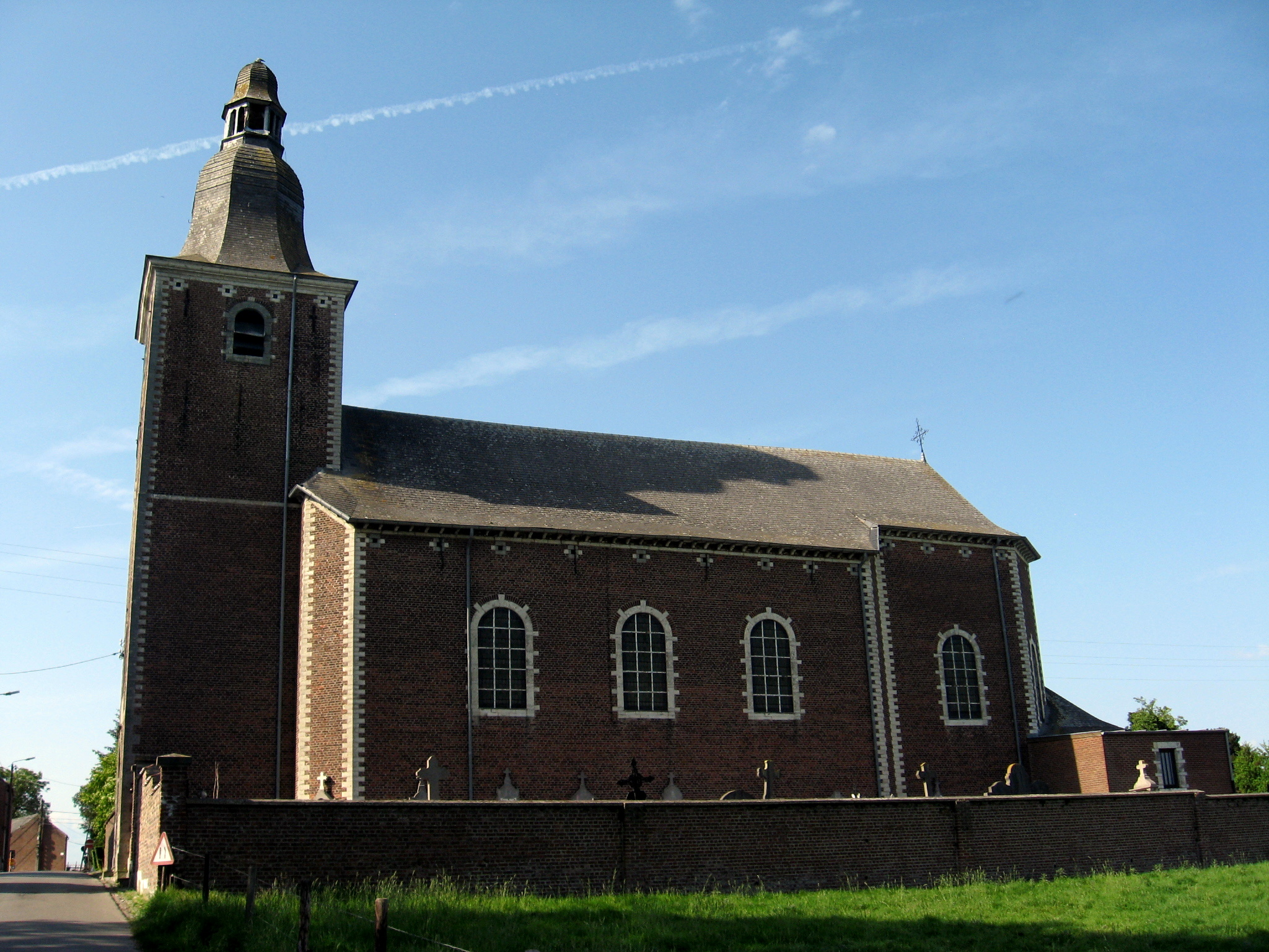 Sint-Jan Baptistkerk in Huppaye